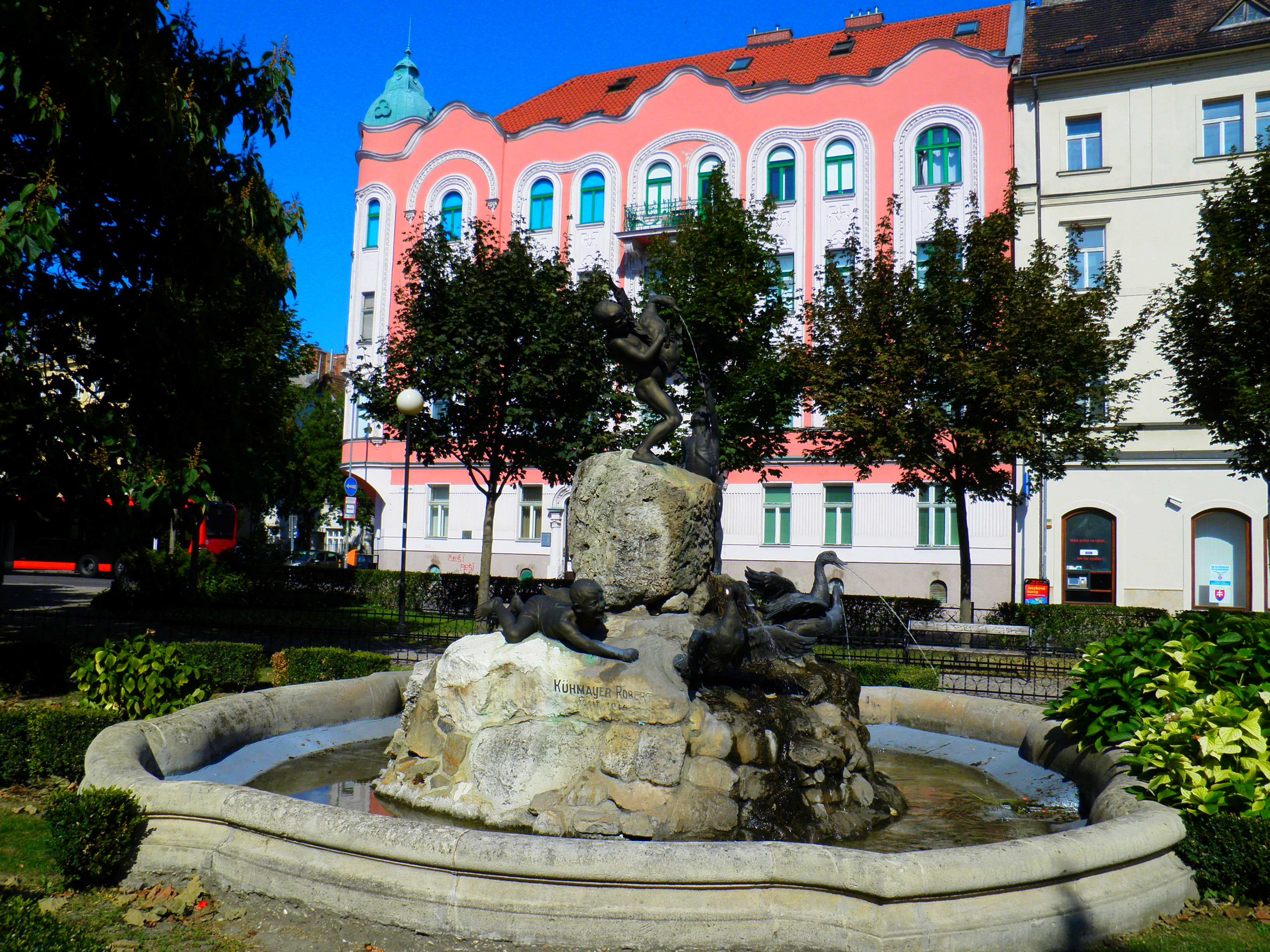 Kačacia fontana